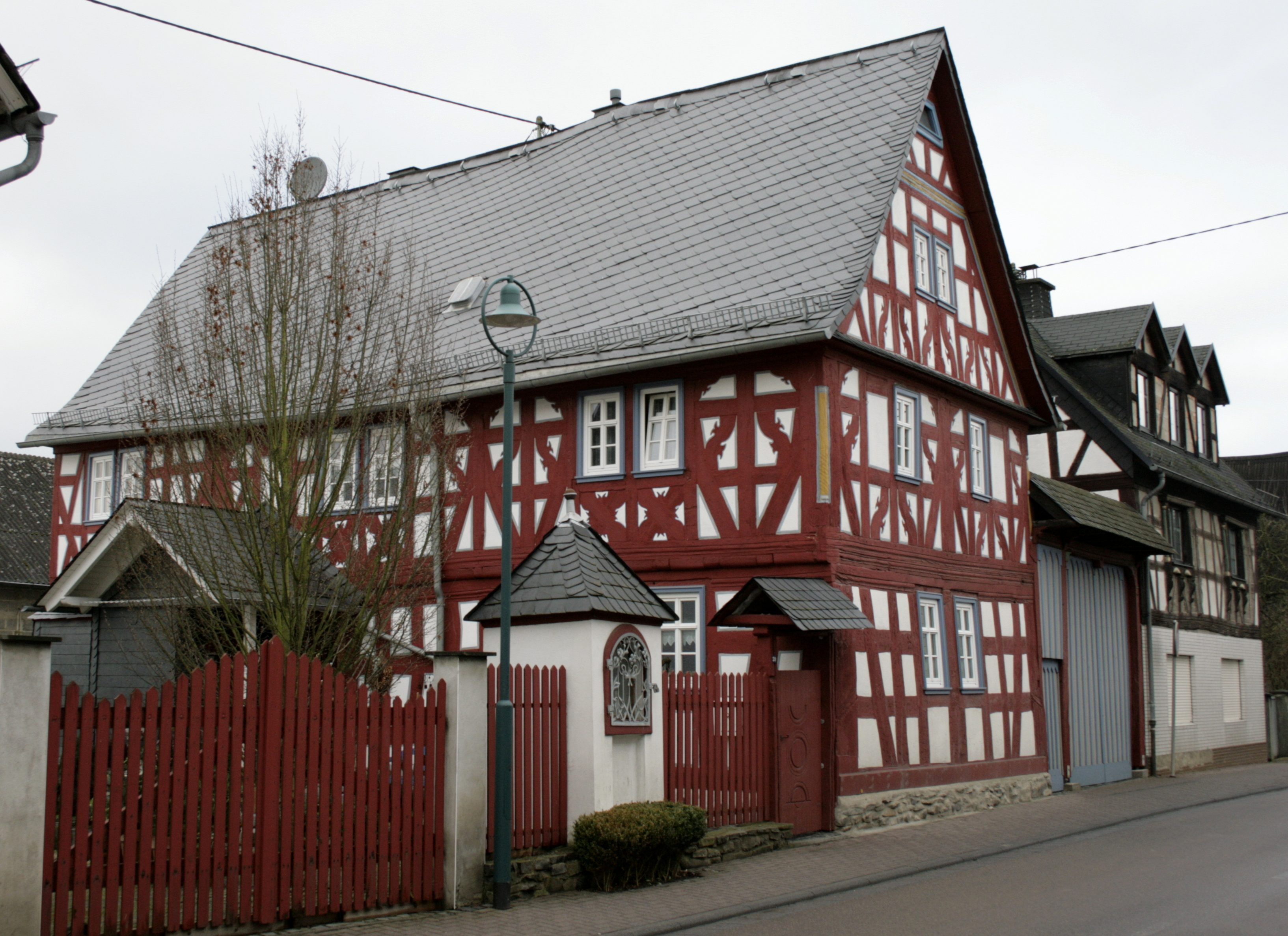 Fachwerkhaus in Hadamar-Steinbach, Deutschland